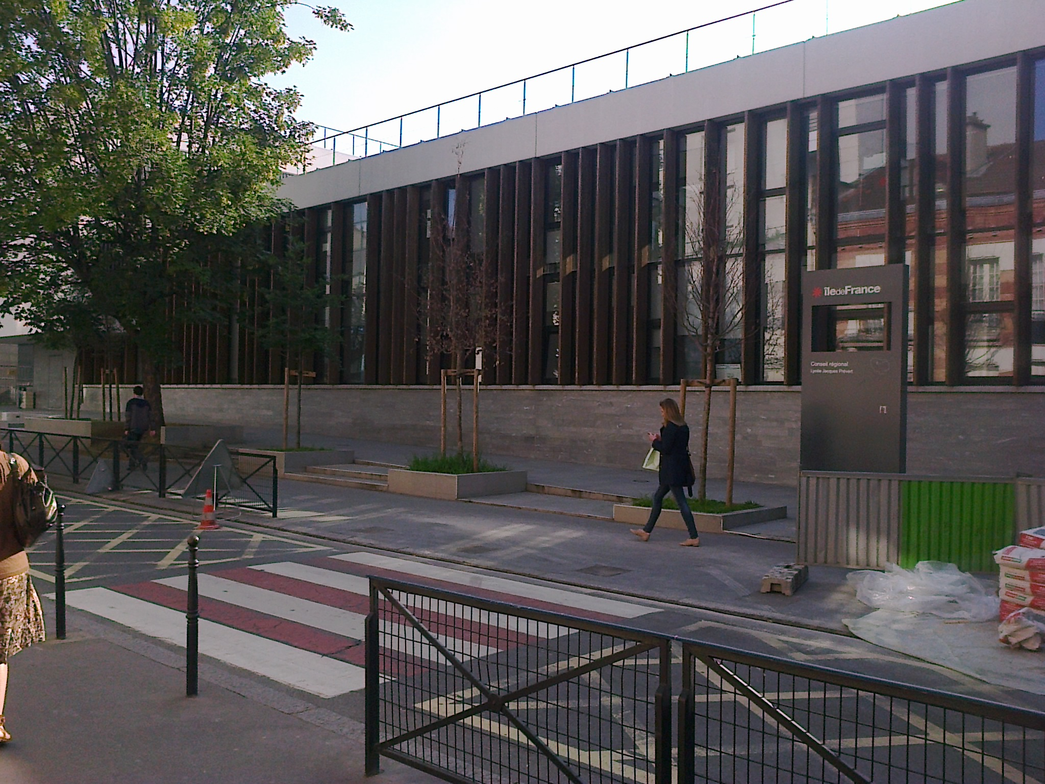 Le lycée Jacques-Prévert de Boulogne-Billancourt (Hauts-de-Seine, France).